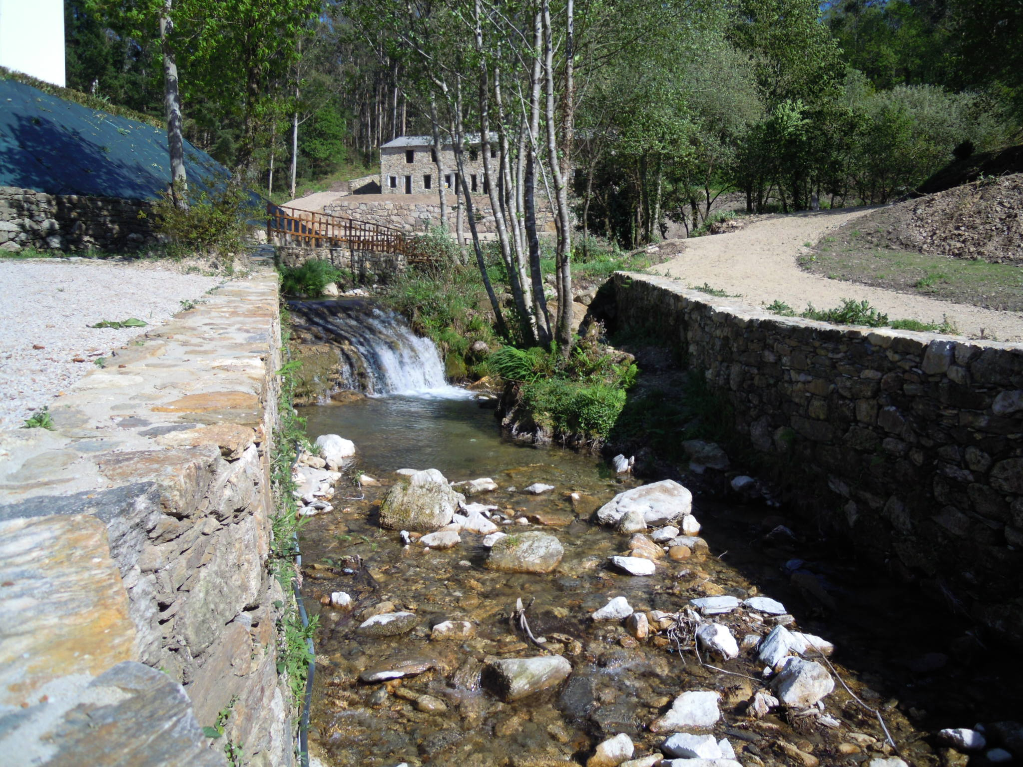 Vista do recinto das minas de San Fins (Lousame), cun rego canalizado e atrás unhas antigas vivendas.